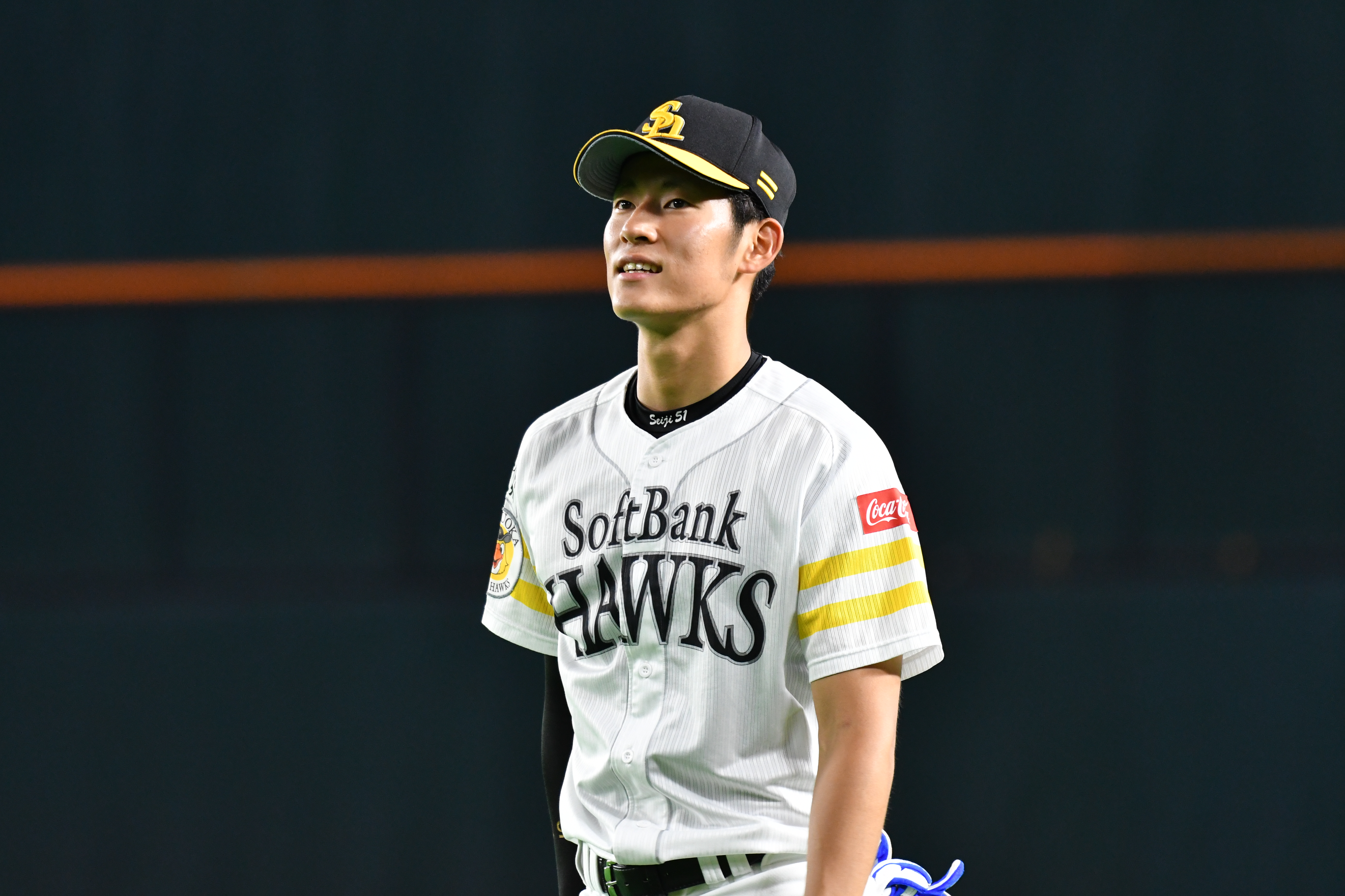 上林 誠知（うえばやし せいじ）プロ野球選手（外野手）。福岡ソフトバンクホークスに所属。